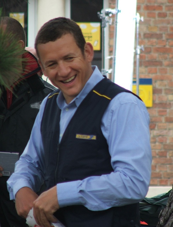 Photo de Dany Boon prise à Bergues lors du tournage du film Bienvenue chez les Ch'tis